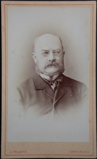 Photo - Portrait des Otto Friedrich Karl von Bernuth (1816-1887), preußischer Beamter.